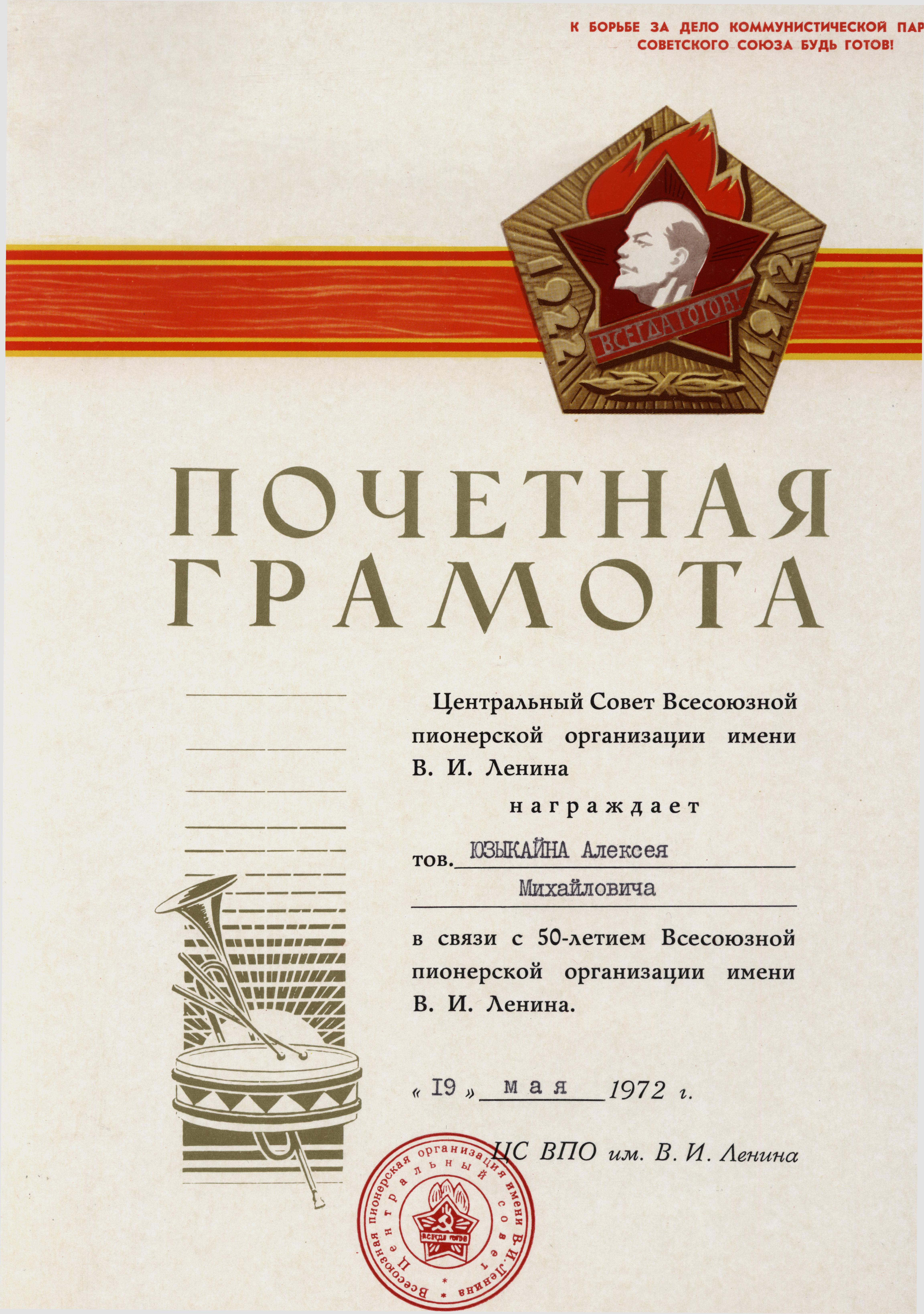 Почетная грамота 50-лет пионерии Юзыкайну А.М.